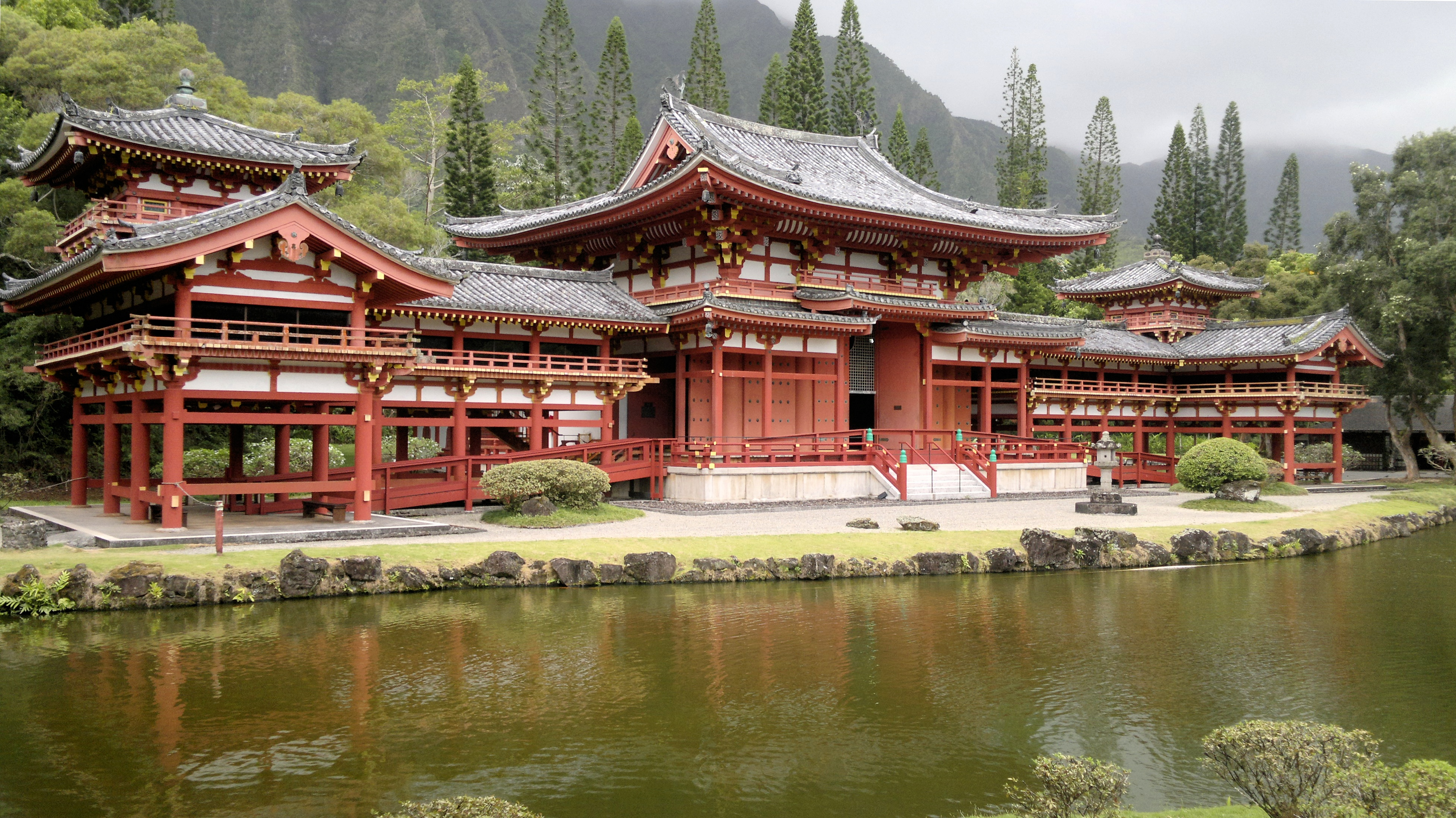 Der Byodo-In Tempel im Tal der Tempel.